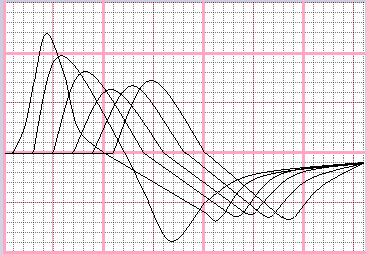 myasth. Dekrement, vereinfacht